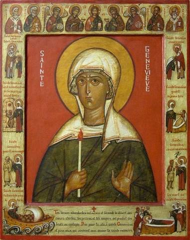 Sainte Geneviève Icône avec épisodes de sa vie.